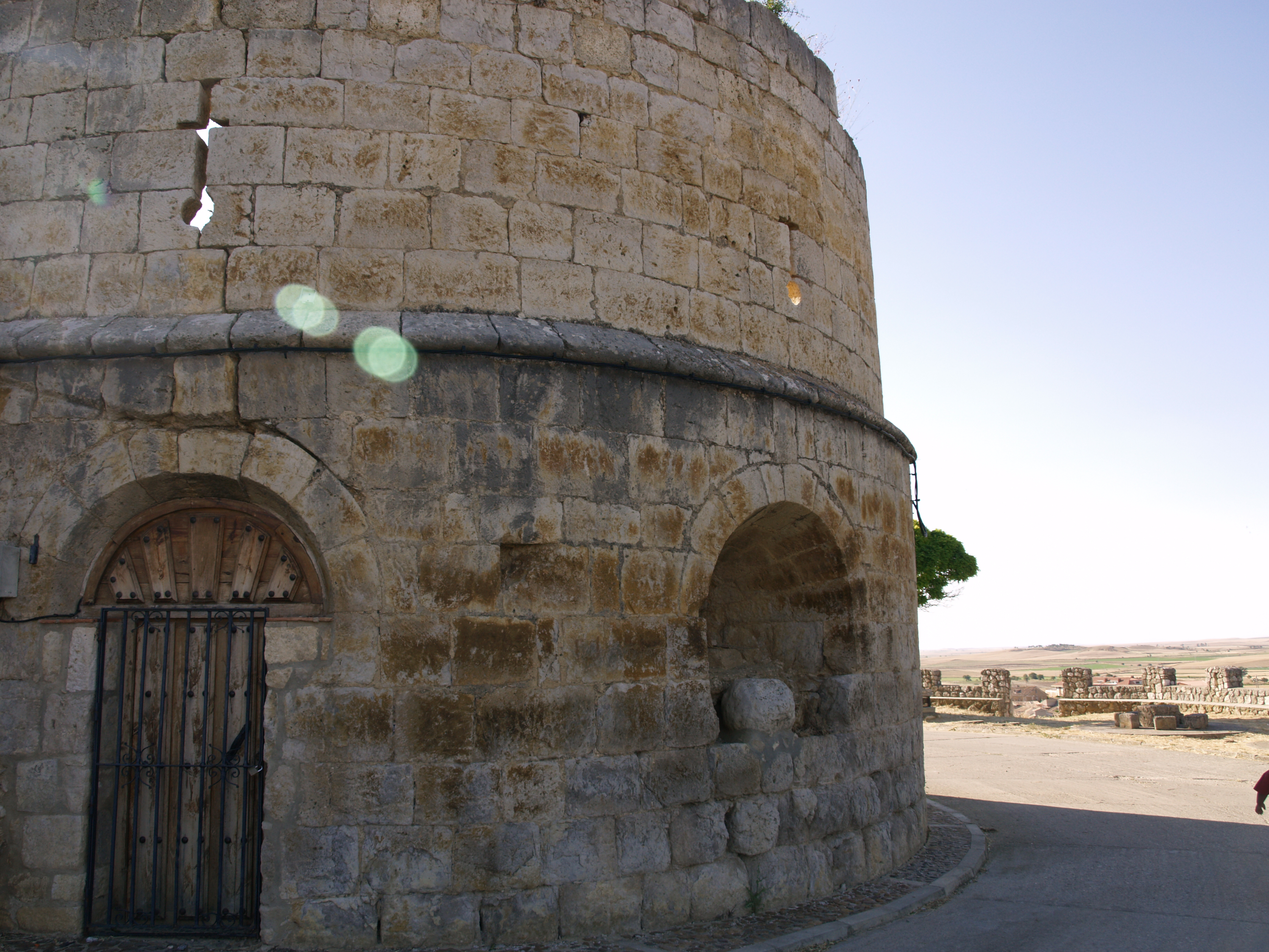 Parte del Castillo en Ruinas de Astudillo